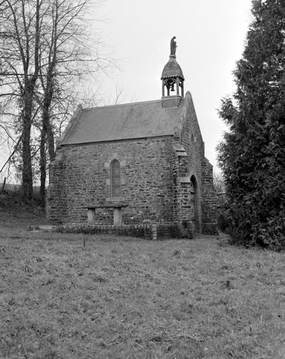 Chapelle Saint Anne au Val-d'Izé (35).